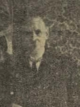 Lorenzo de Cura y Pérez Caballero